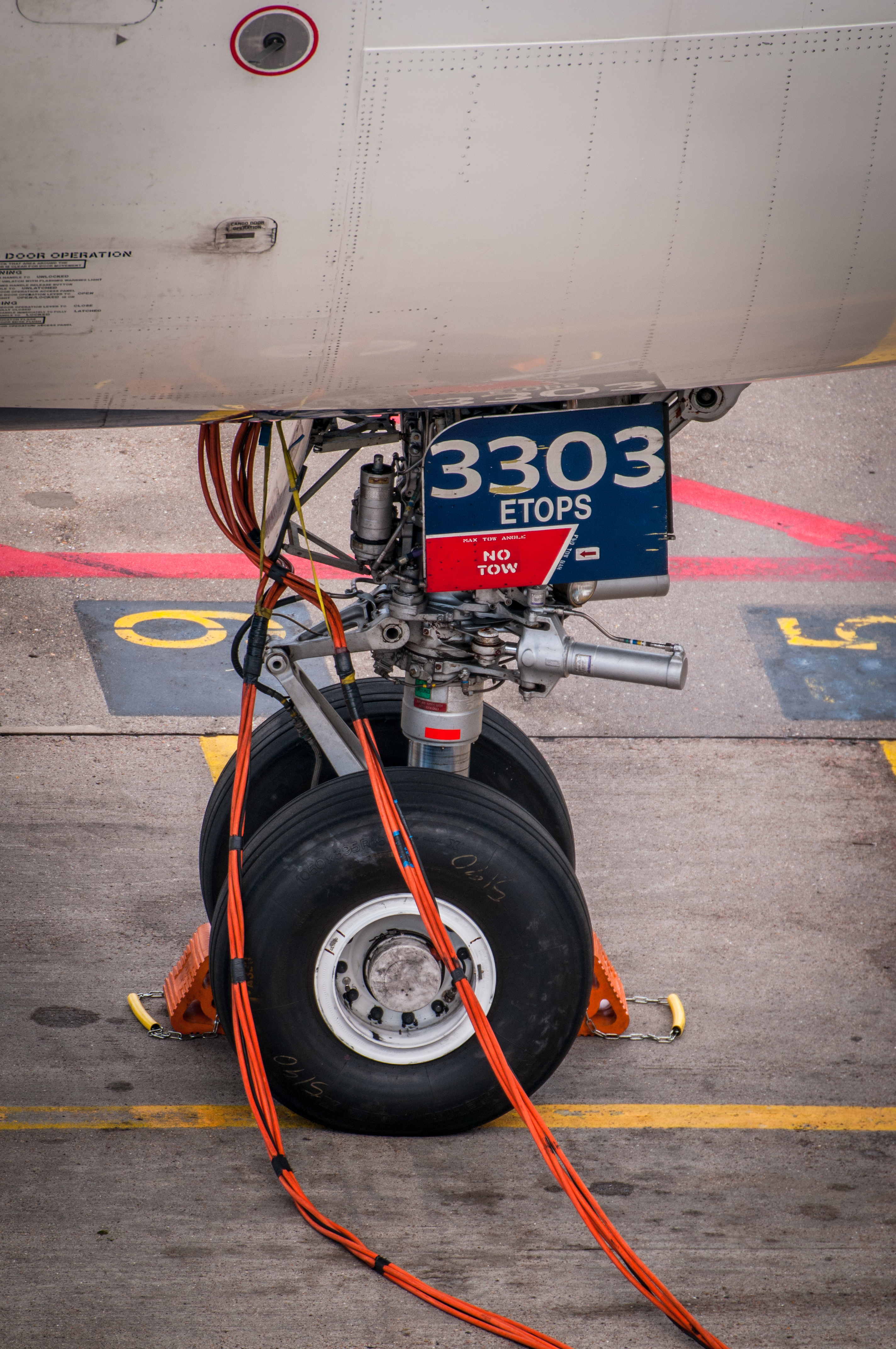 Nikon D300 with Tamron SP70-300 F/4-5.6 Di VC USD